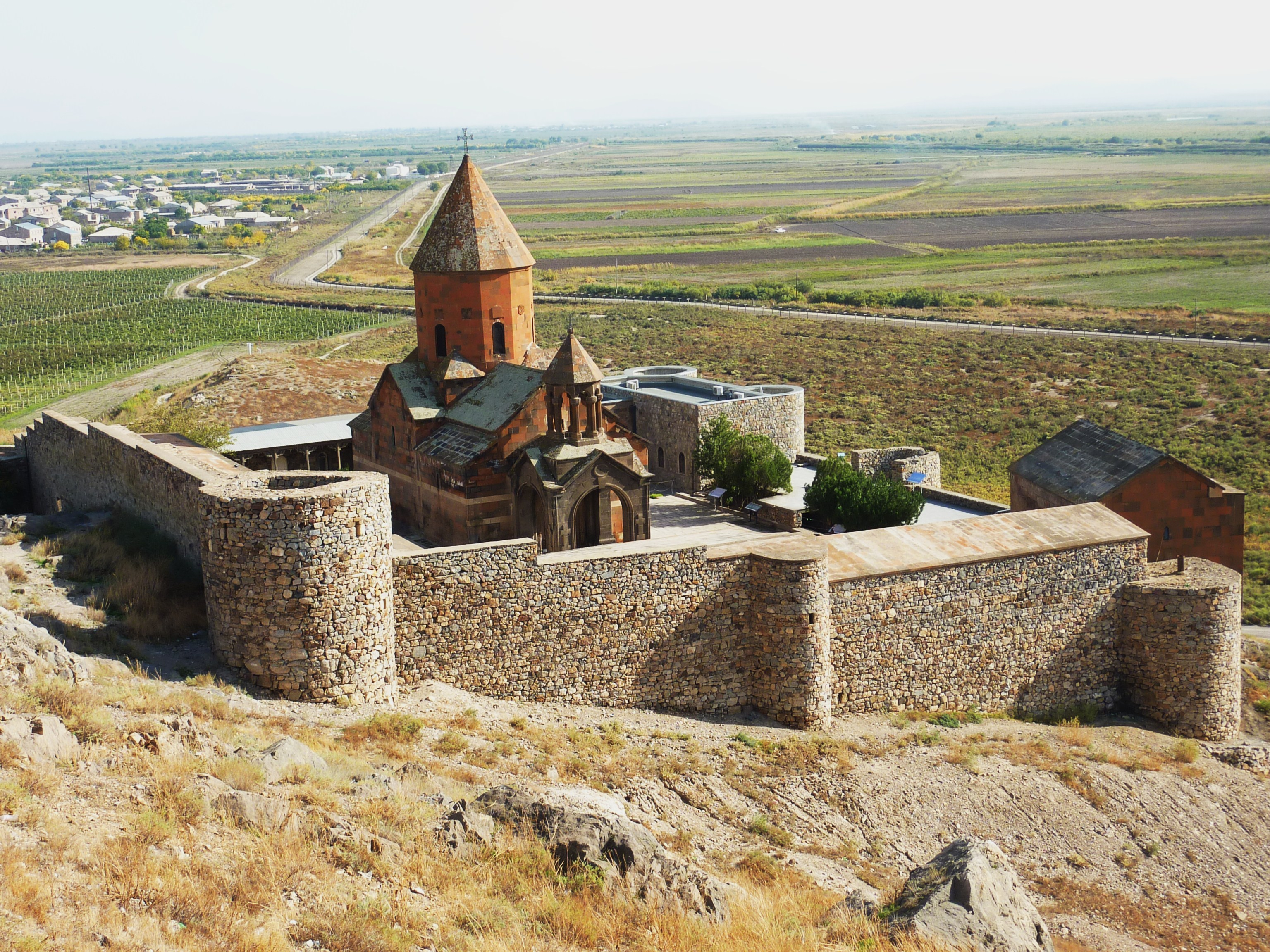 Le monastère de Khor Virap vu de près